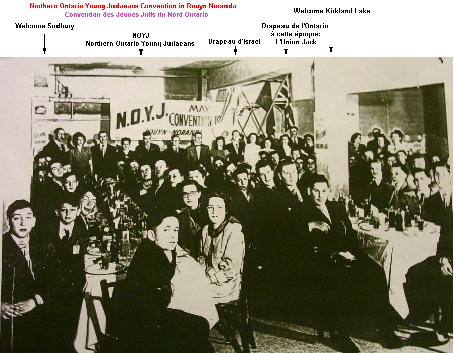 Photocopie d'une photo envoyée par Mrs Mednick sur la «Northern Ontario Young Judaeans Convention». Cette photo a été prise à la synagogue de Rouyn-Noranda (Québec).